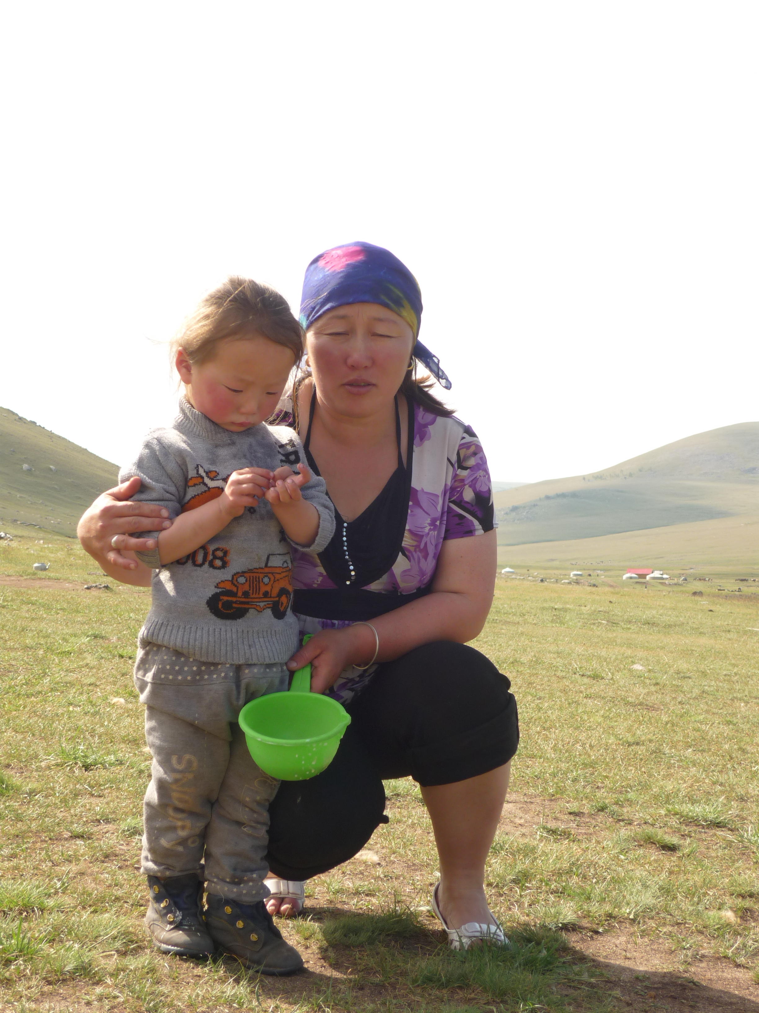 Voyage Mongolie Juillet 2012 La mère et le plus jeune fils de la seconde famille qui nous avait accueilli. À noter que le petit (presque 5 ans) est généralement habillé en fille et a les cheveux longs, pour éloigner le diable.